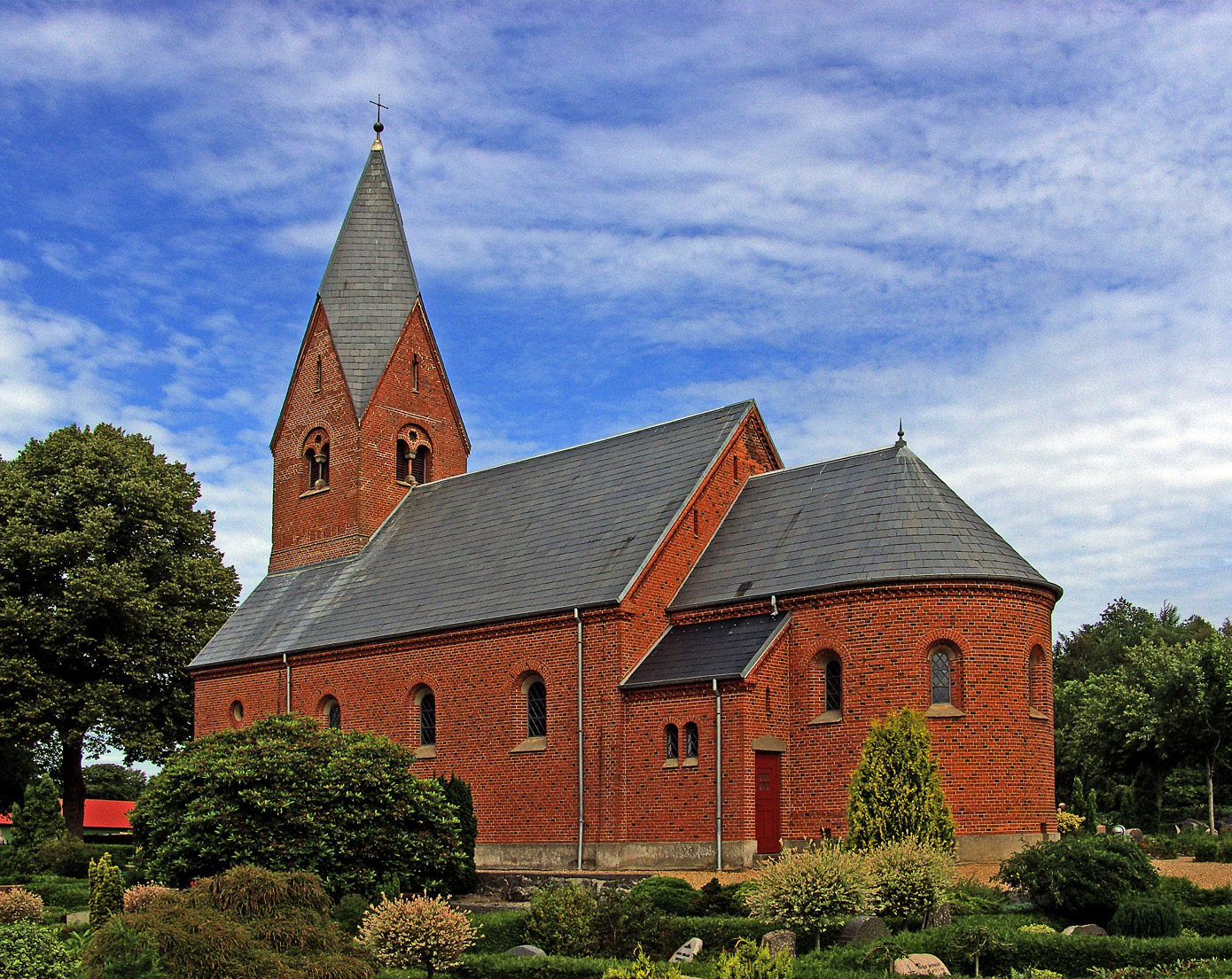 fra sydøst